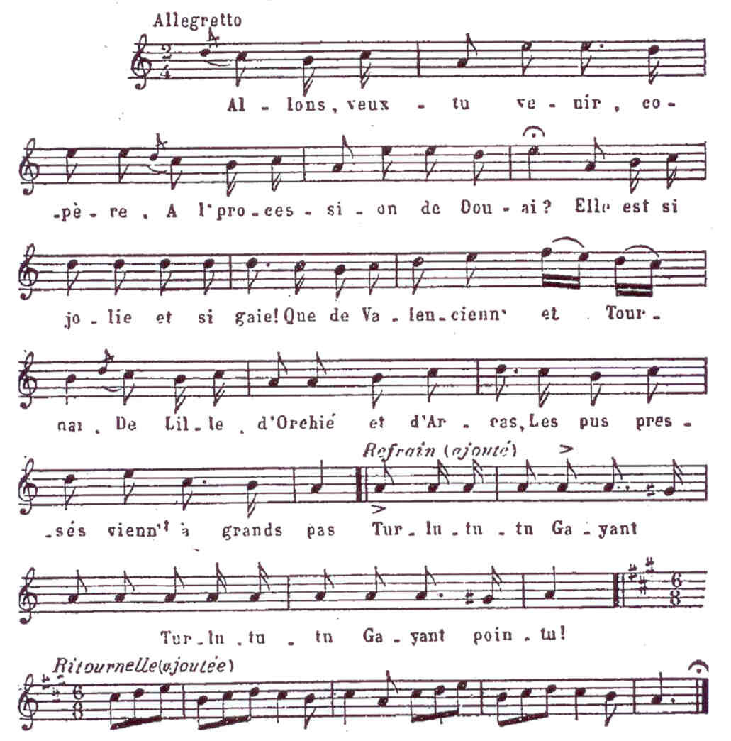 L'air de Gayant, famille de géants de Douai.